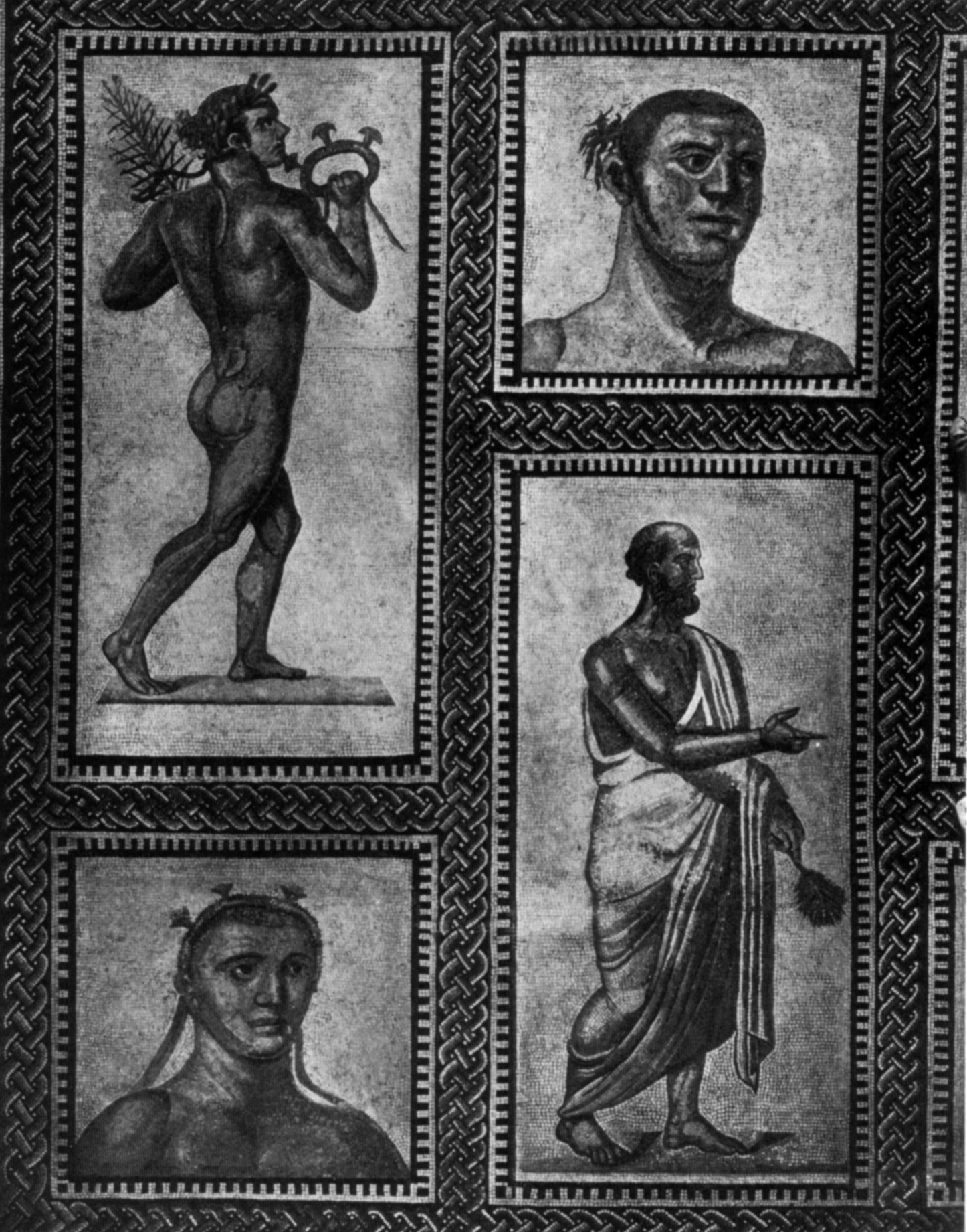 Mosaico con atleti dalle terme di Caracalla, III secolo d.C. Oggi nei Musei Vaticani.